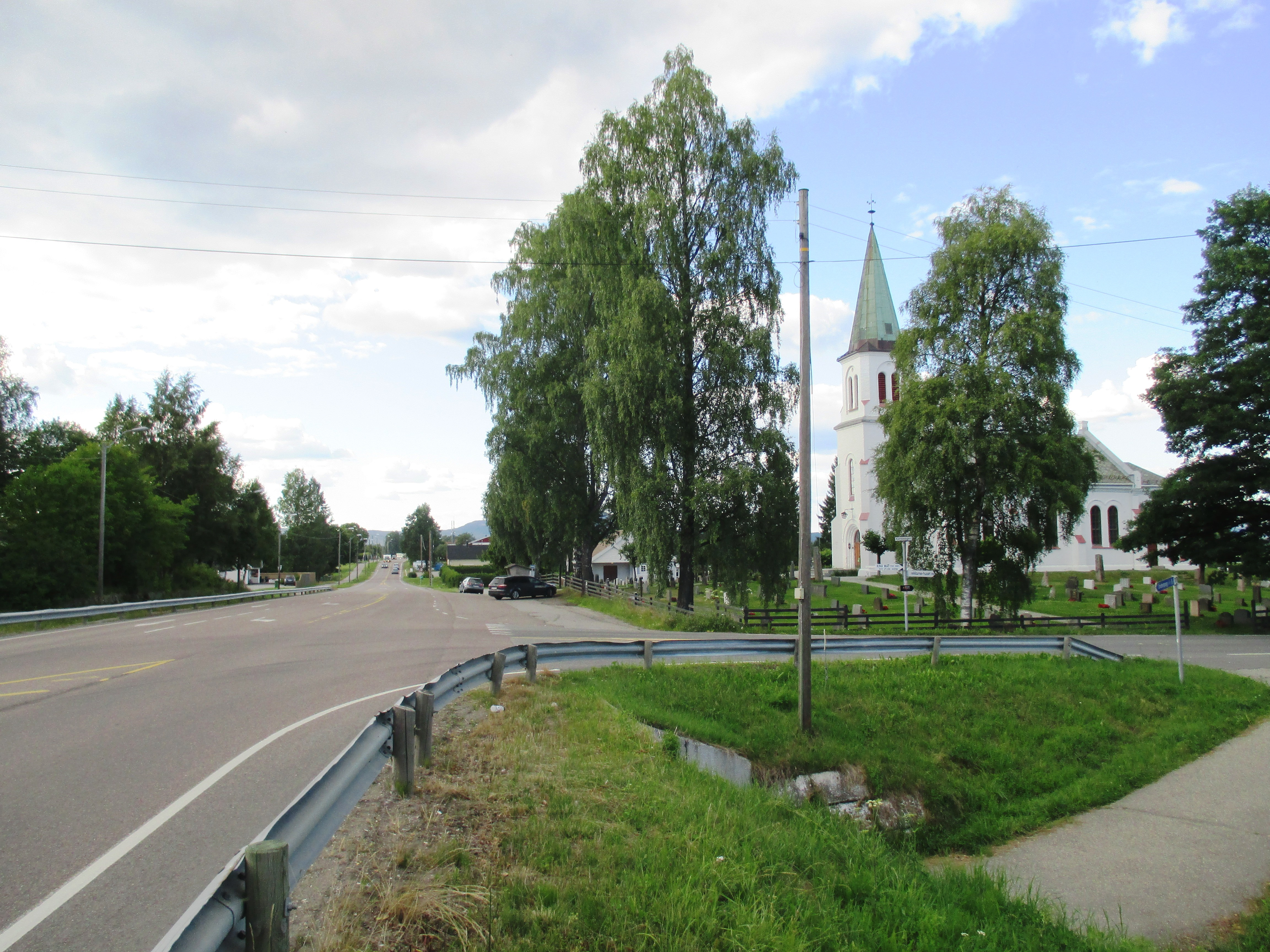 Fylkesvei 501 ved Råholt kirke